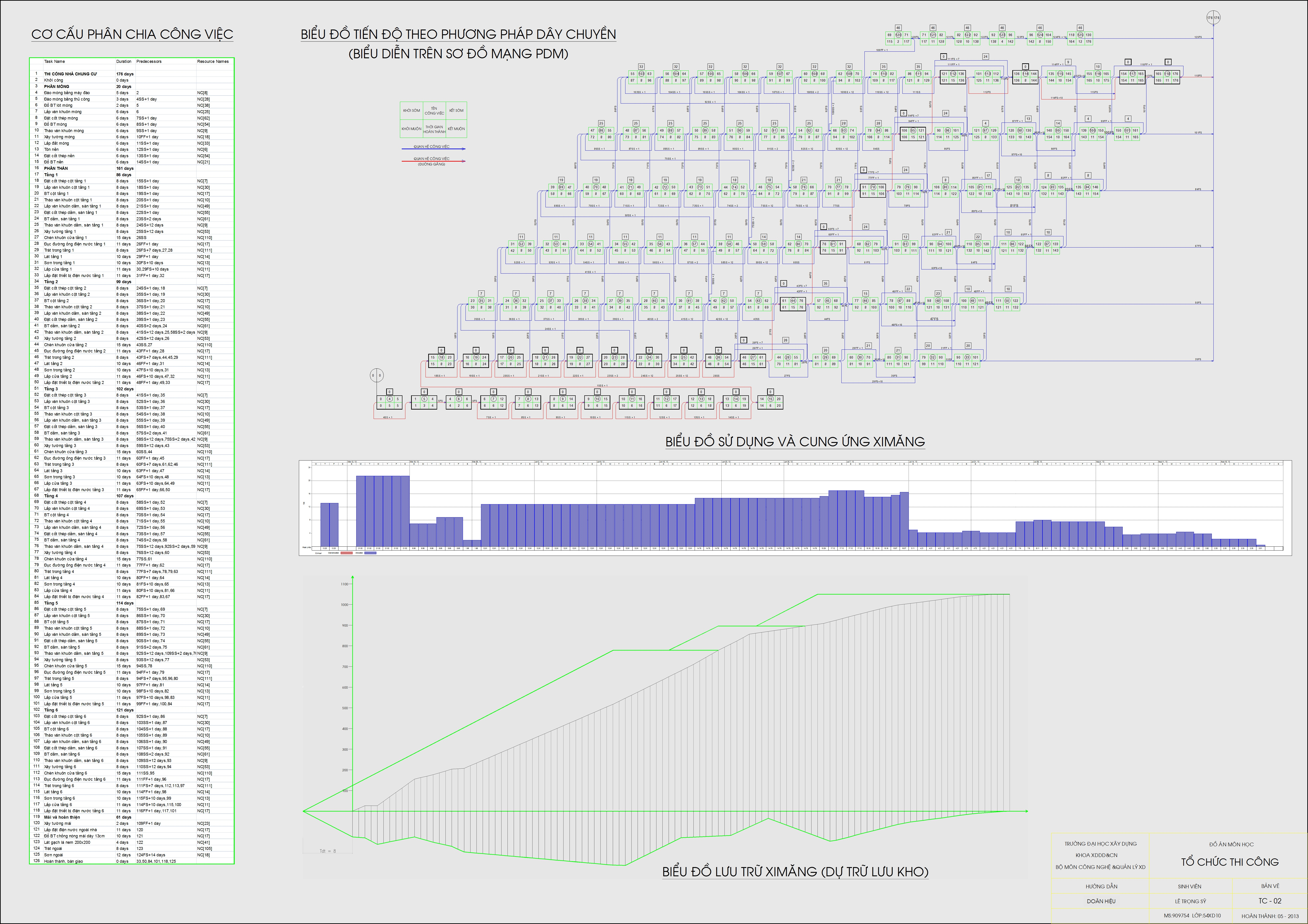 Bản vẽ đồ án tổ chức thi công lập tiến độ xây dựng công trình, và biểu đồ một dạng tài nguyên cho xây dựng công trình.